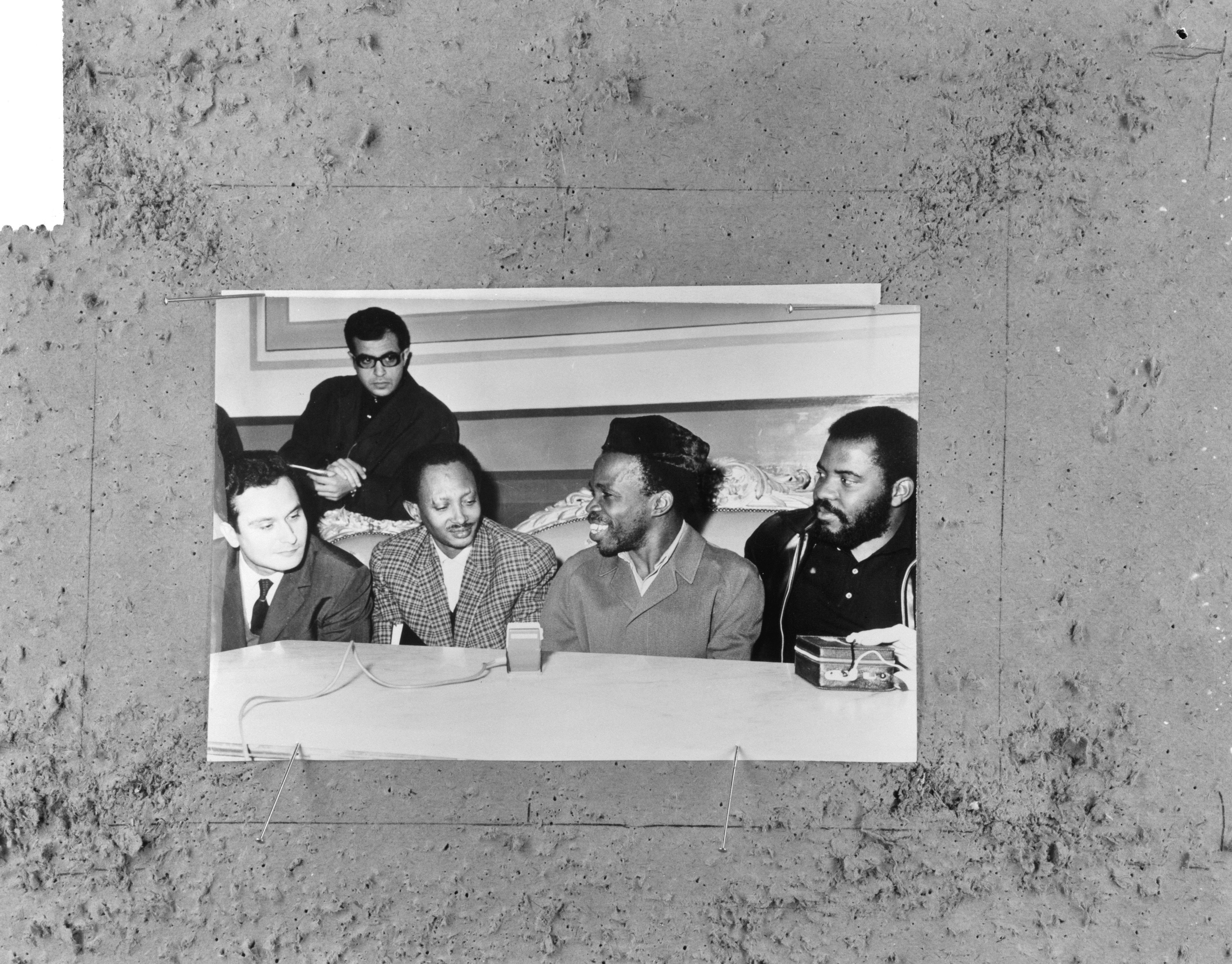 Collectie / Archief : Fotocollectie Anefo Reportage / Serie : [ onbekend ] Beschrijving : Soumialot ( minister van Defensie rebellen in Congo) bij verjaardag Assouan-dam Datum : 18 januari 1965 Locatie : Congo Trefwoorden : REBELLEN, verjaardagen Fotograaf : Fotograaf Onbekend / Anefo Auteursrechthebbende : Nationaal Archief Materiaalsoort : Negatief (zwart/wit) Nummer archiefinventaris : bekijk toegang 2.24.01.04 Bestanddeelnummer : 917-3511